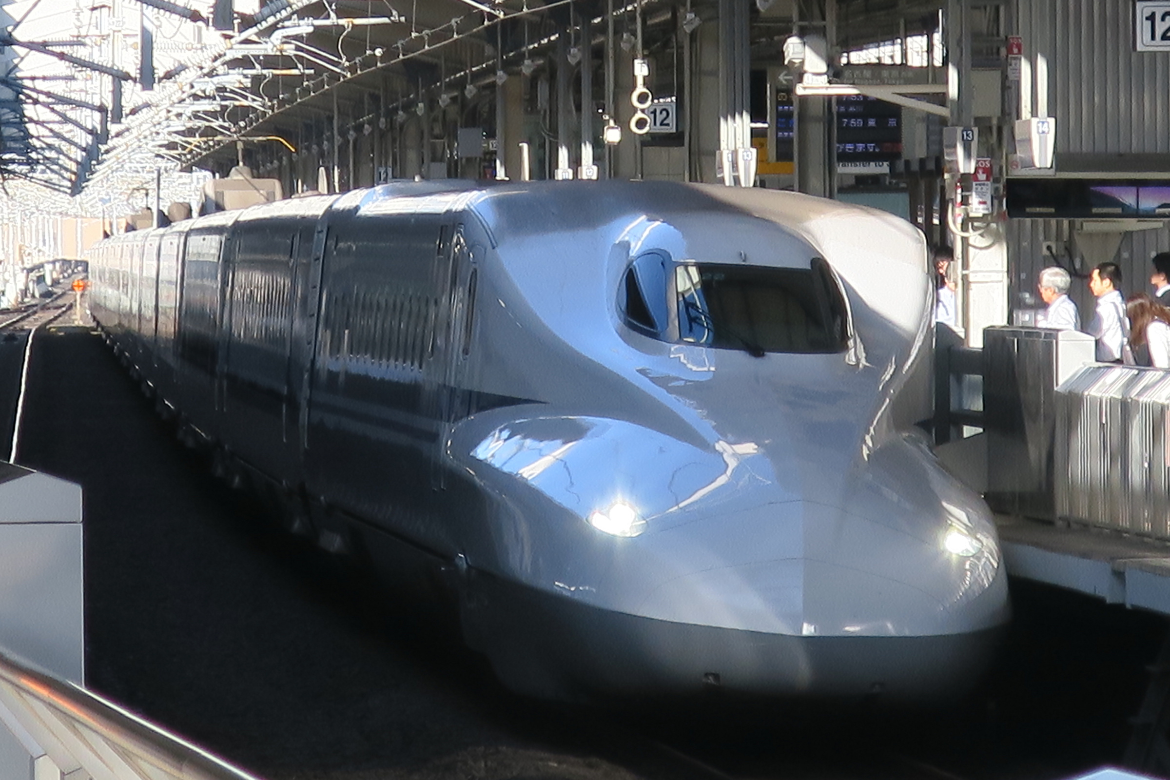 700 series Shinkansen in Kyoto station.